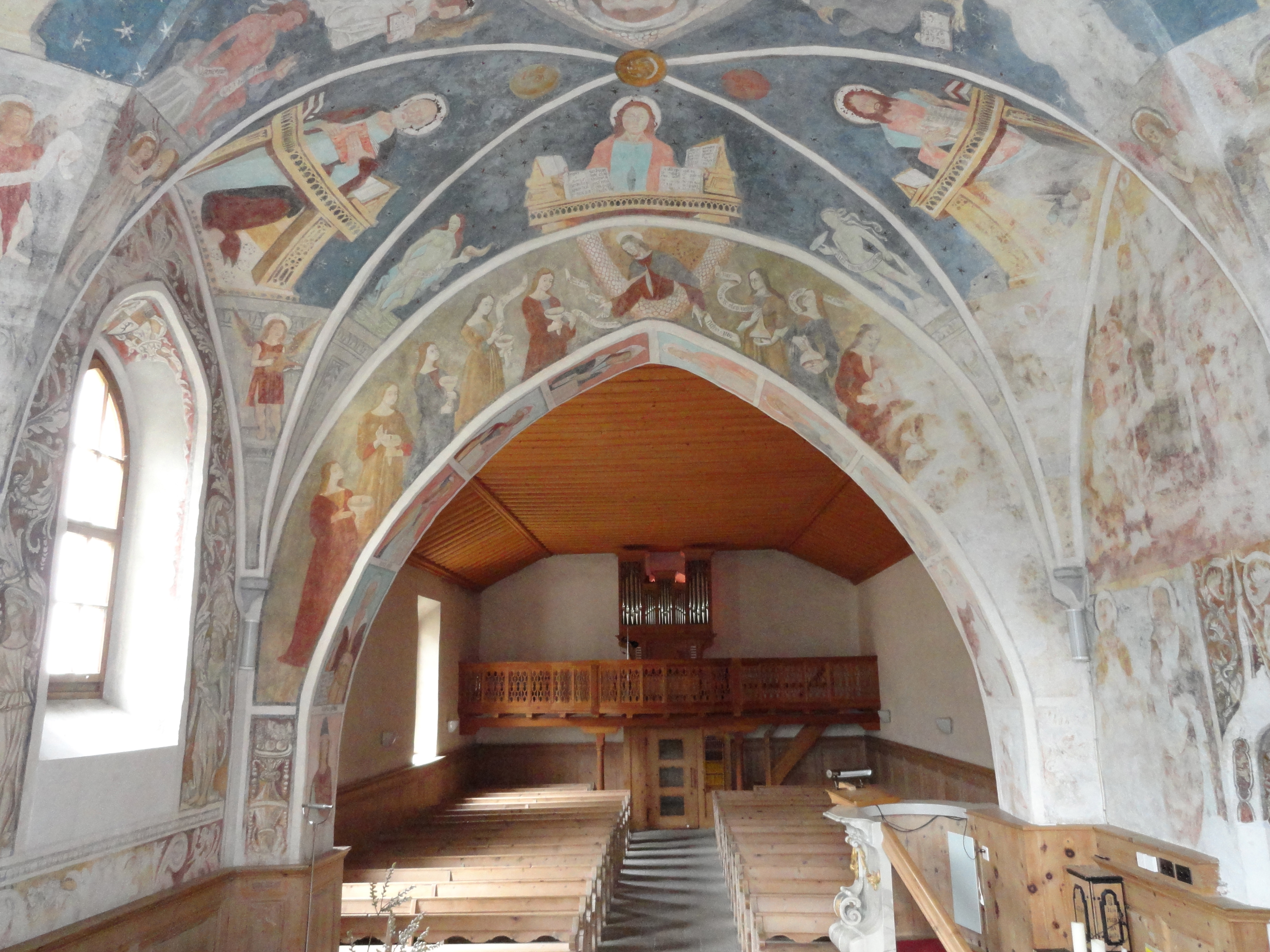 Reformierte Kirche Lavin Blick zum Eingang